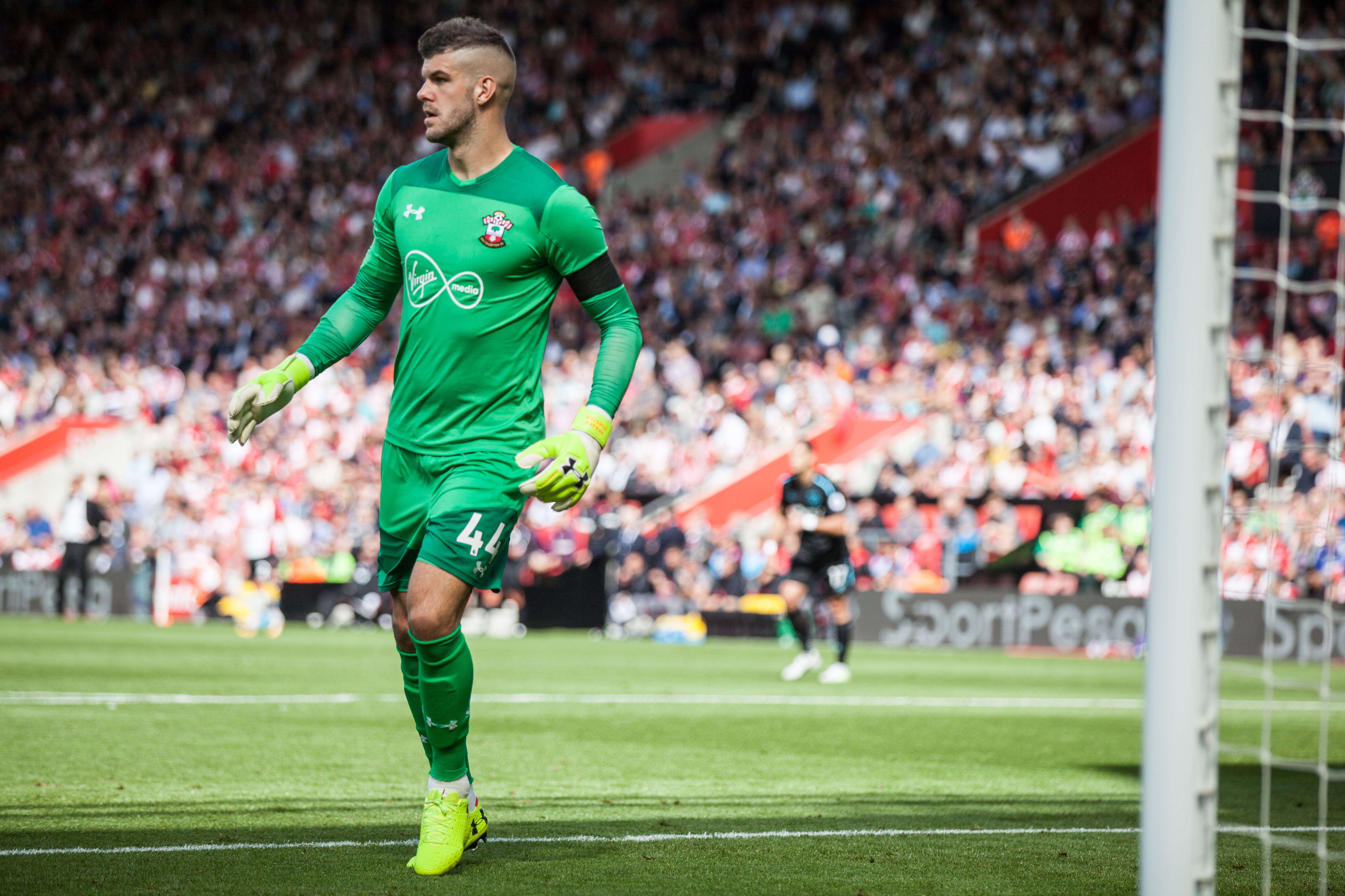 Southampton vs West Ham 3-2